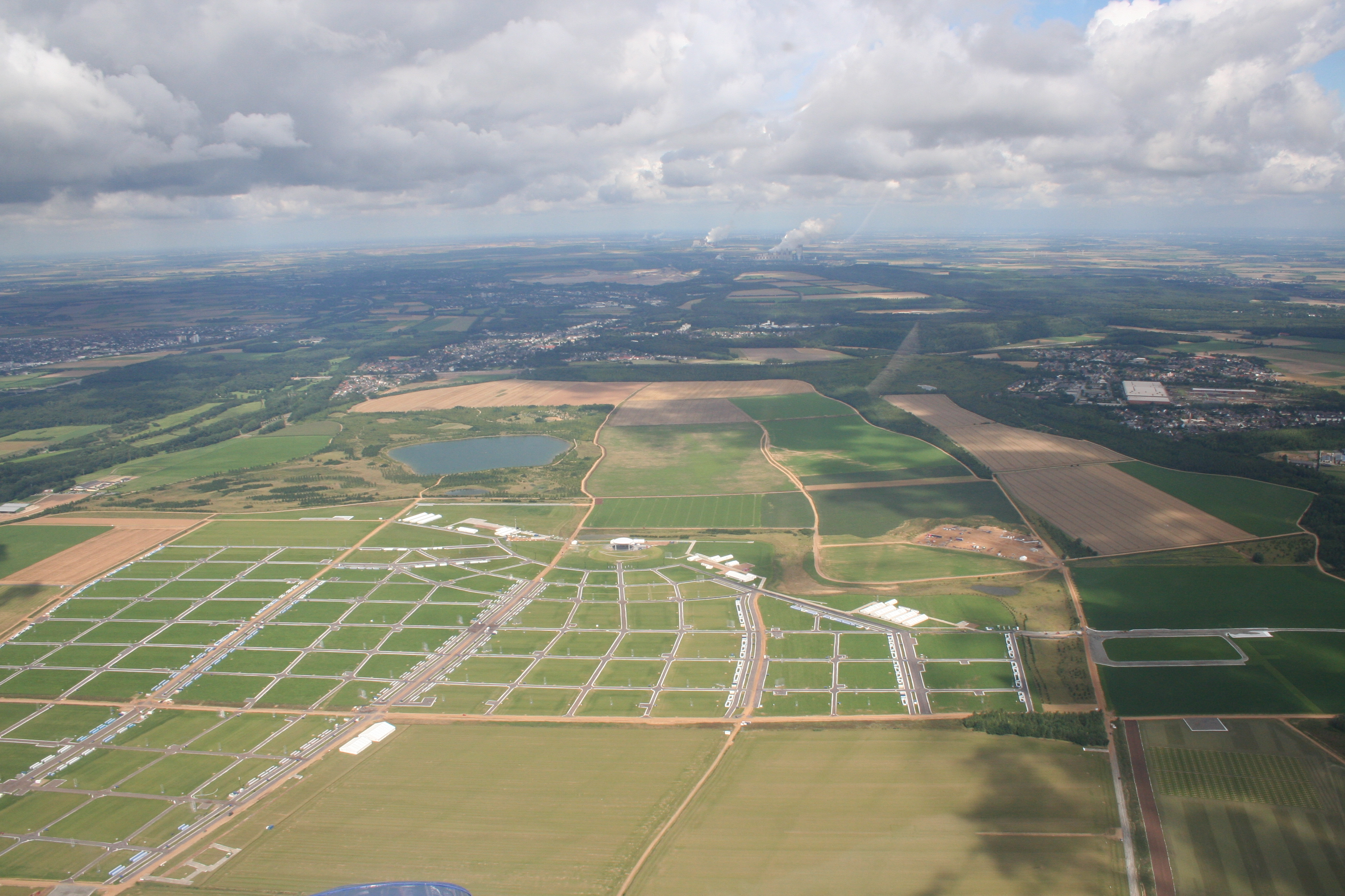 Das Marienfeld und Umgebung 13 Tage vor der Papst-Messe. Auf dem kompletten Gebiet sind Wege und Straßen errichtet worden. Im Hintergrund Horrem, Habbelrath und Grefrath